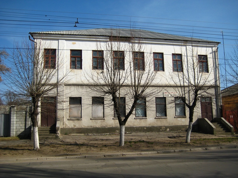 Бывшее здание аптеки Абрама Краснова